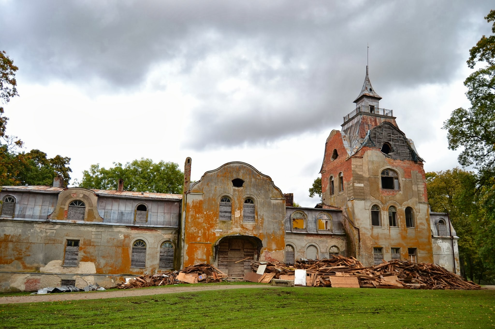 Neeruti mõisa peahoone